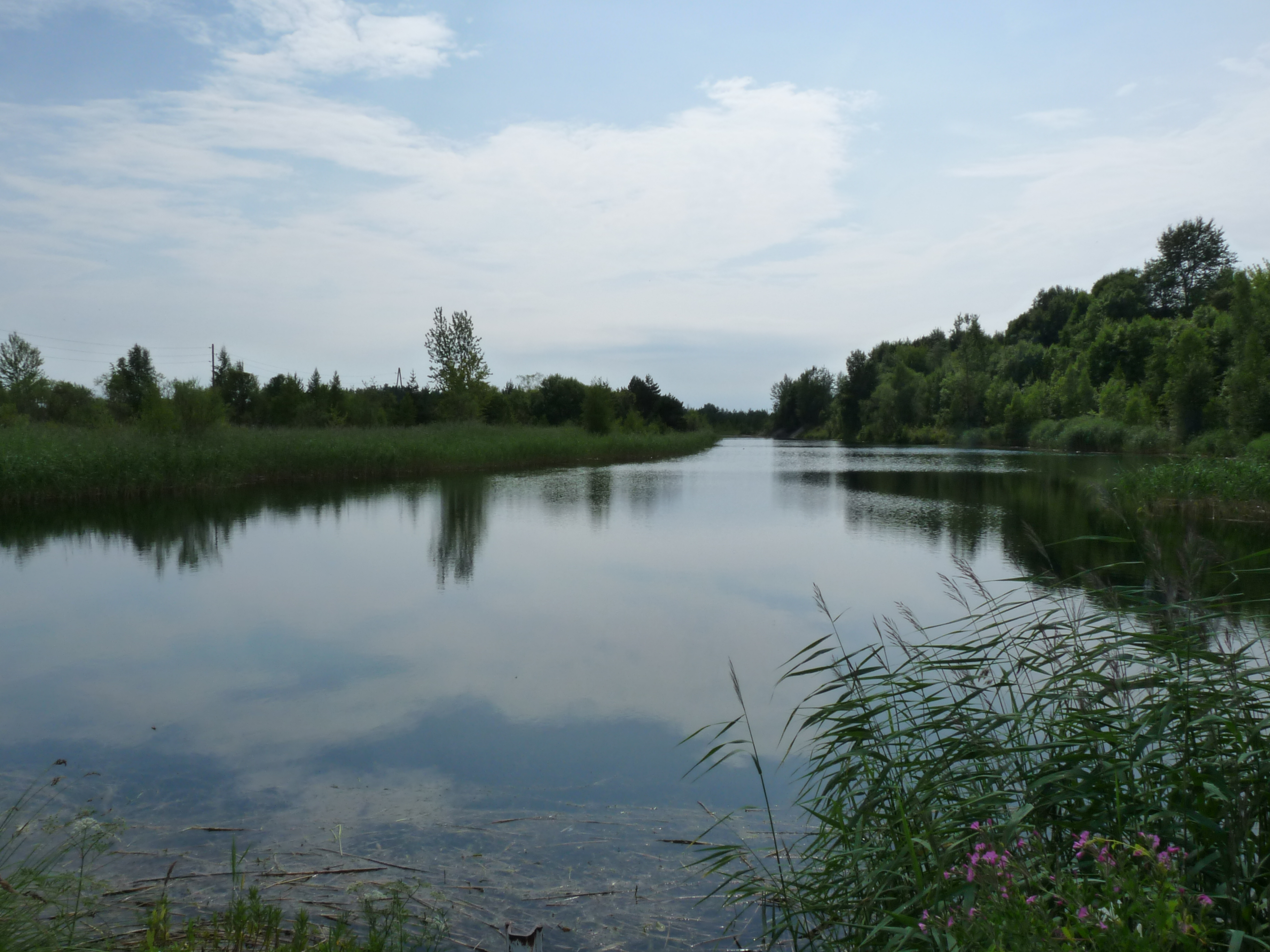 Pumbajärv